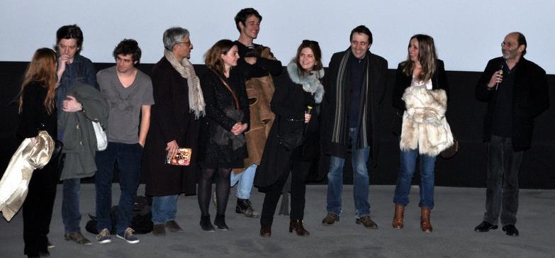 Parmi d'autres : Didier Sandre, Valérie Crouzet, Laurent Poitrenaux, Clément Roussier, Agnès Jaoui, Jean-Pierre Bacri, Agathe Bonitzer et Benjamin Biolay à une avant-première